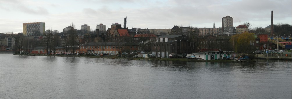 Wyspa Jaskółcza widziana z Kępy Parnickiej, Szczecin